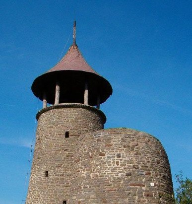 Kozmáry-kilátó near Mátrafüred